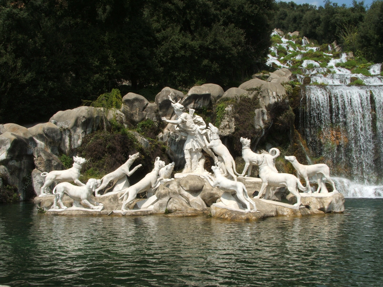 Immagine dalla Reggia di Caserta, Caserta, Campania, Italia. Statue e fontane nel parco